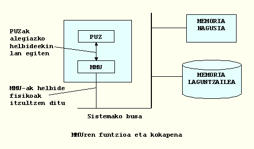 Memoria kudeketaren irudikapenak